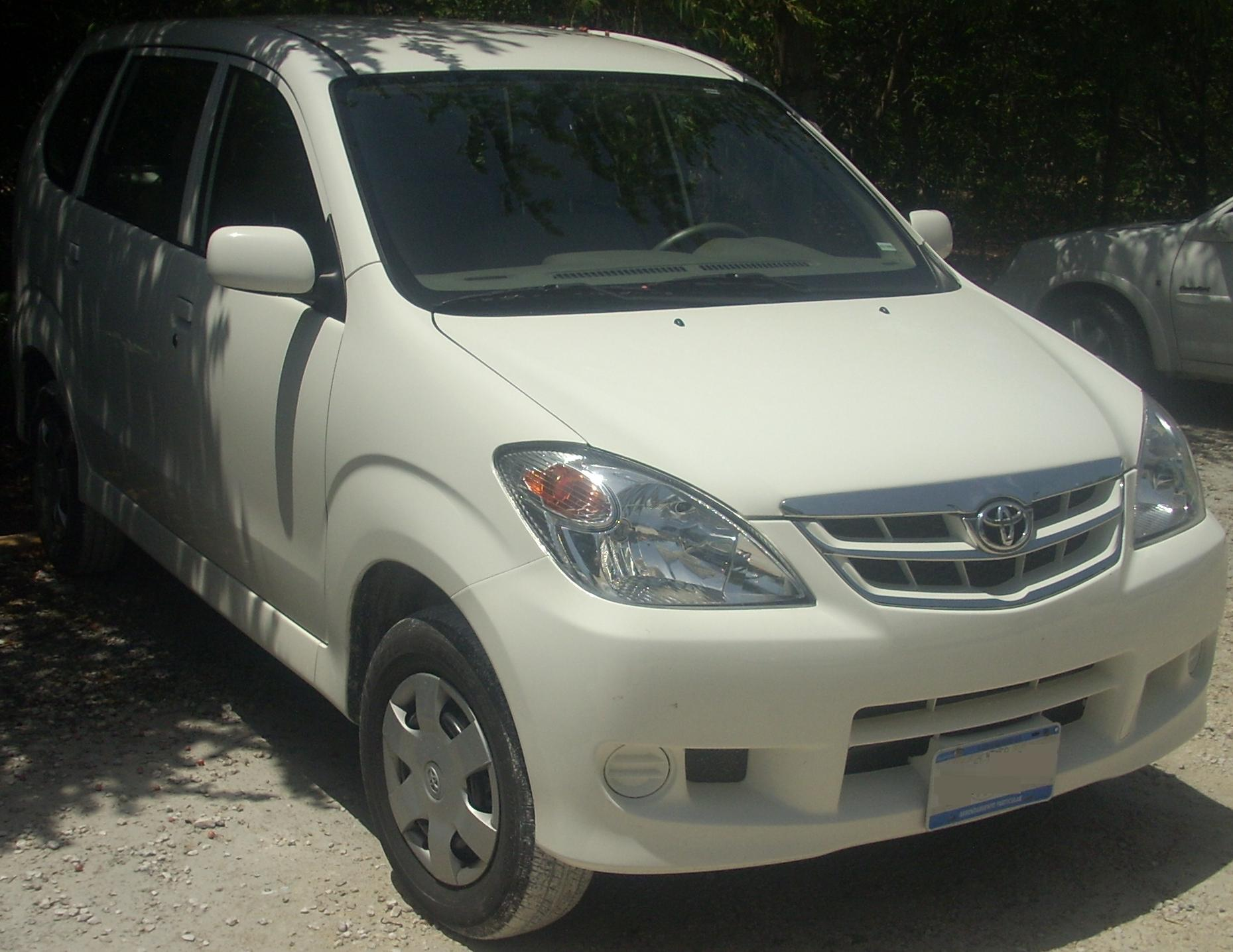 2007-present Toyota Avanza photographed in Cancun, Quintana Roo, Mexico.